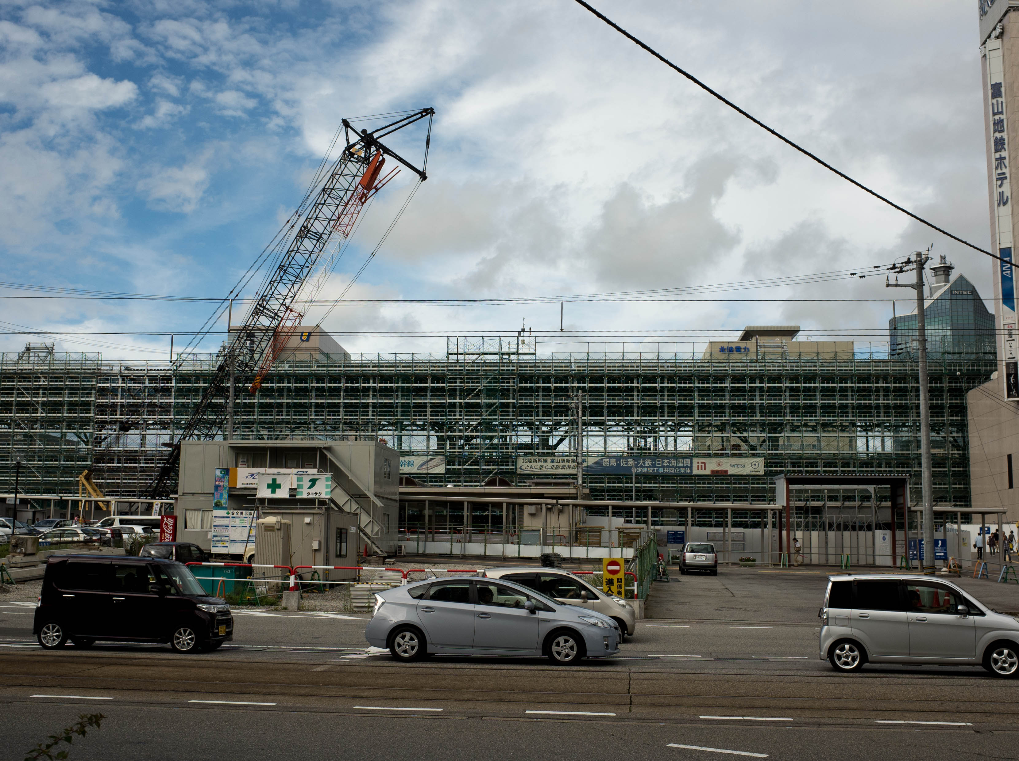 富山駅（改装中）